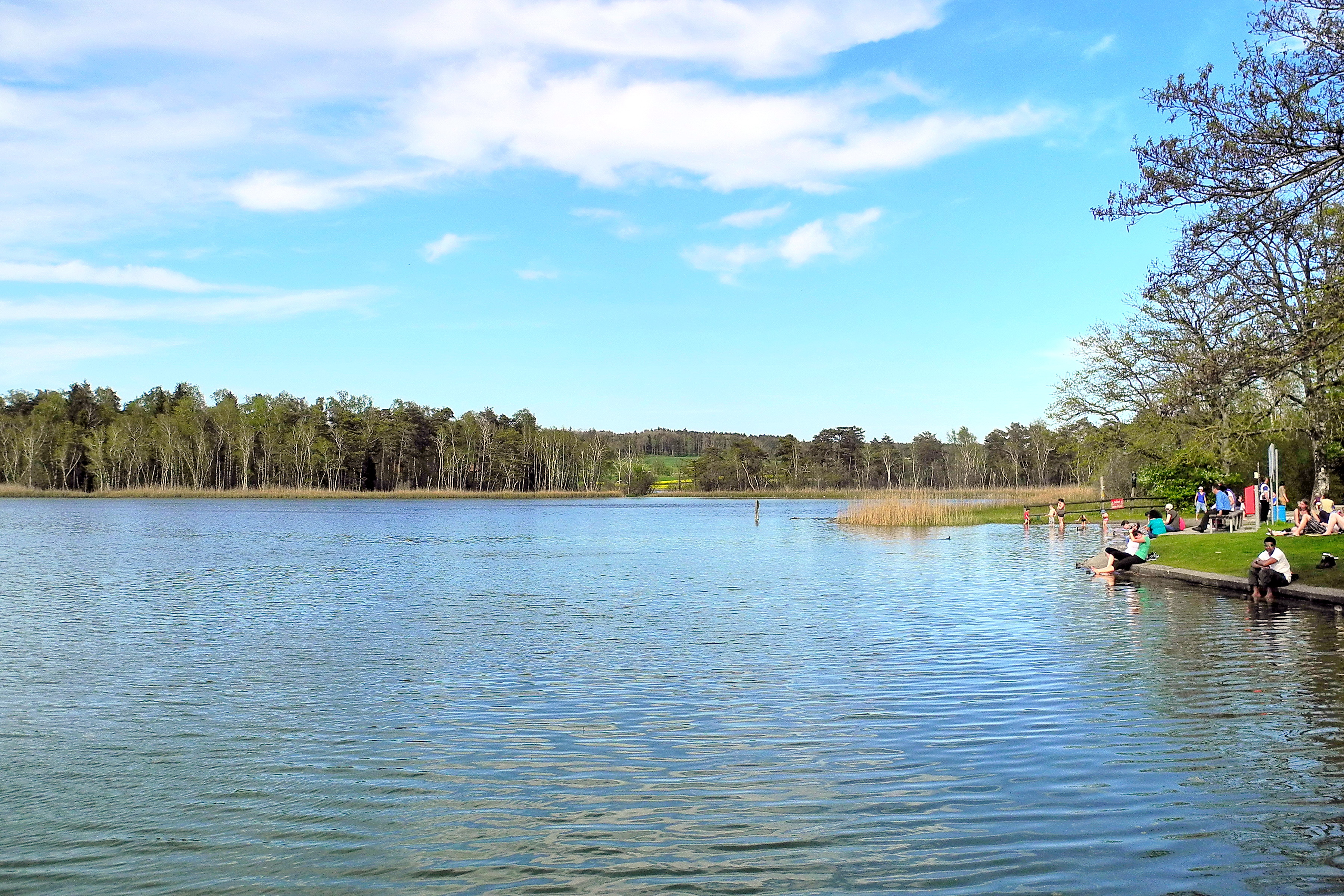 Strandbad Katzensee in Zürich-Affoltern (Switzerland)